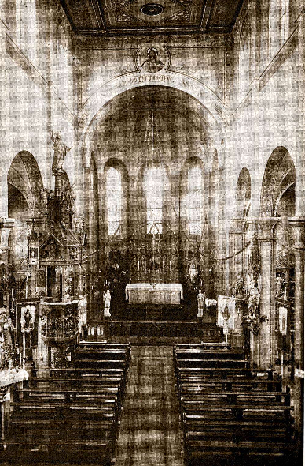 Innenraum der Pfarrkirche St. Vicelin, Neumünster, um 1910